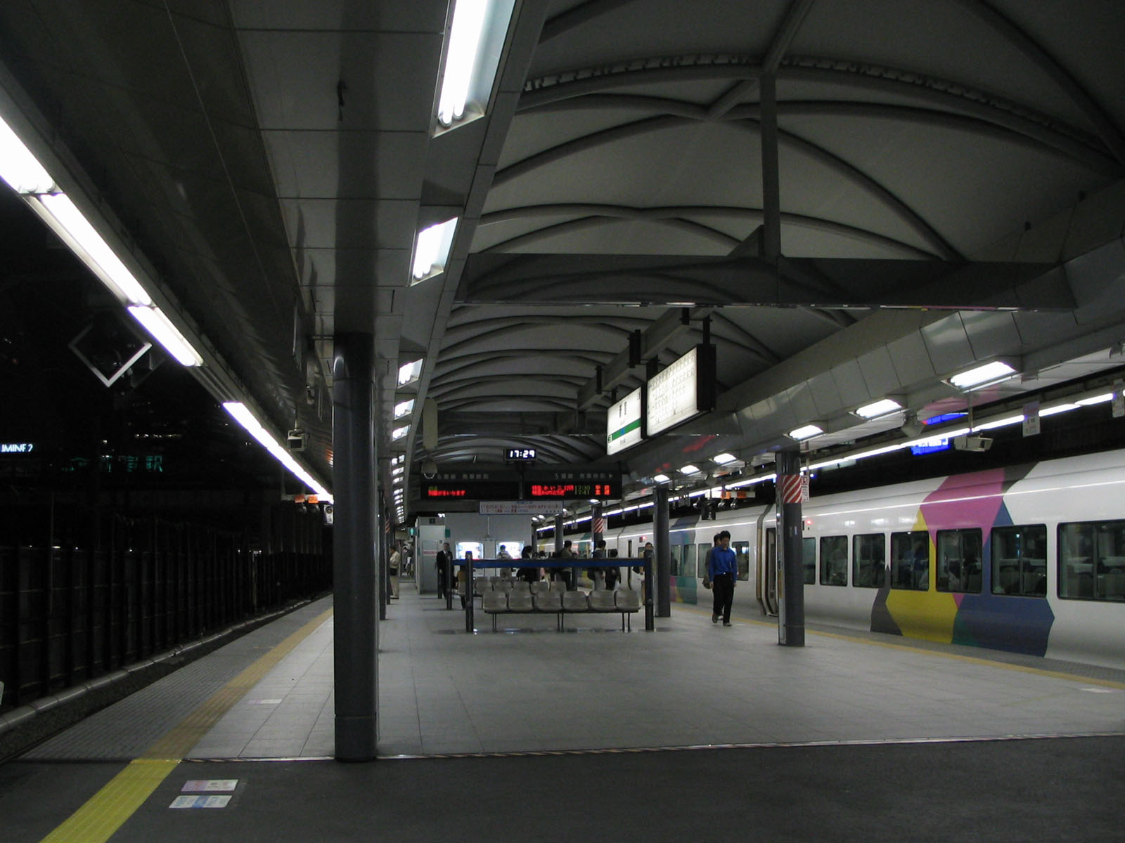 JR新宿駅 5・6番のりば 当時の中央線特急ホーム